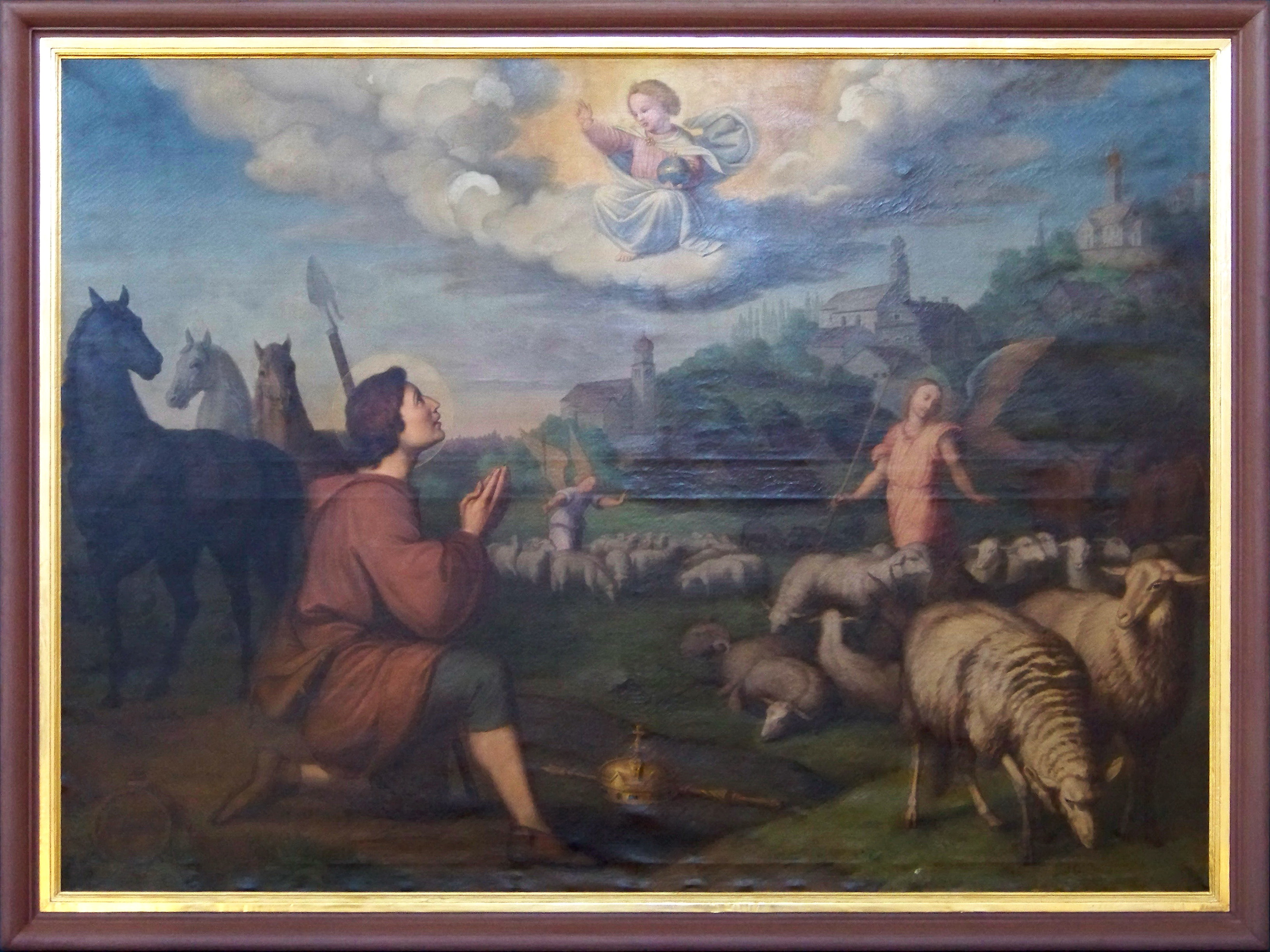 Laberweinting, Hofkirchen 77, katholische Pfarrkirche St. Peter erbaut 1863/64. An der Südwand des Kirchenschiffes hängt dieses Gemälde des Münchner Malers Thomas Guggenberger (1815 - 1882) aus dem Jahre 1853. Das Bild in Öl auf Leinwand hat eine Größe von 267 x 197 cm. Es zeigt den Heiligen Wendelin, für den zwei Engel während seines Gebetes den Hirtendienst übernehmen. Darüber befindet sich auf einer Wolke der Jesusknabe mit dem Reichsapfel, der segnend seine Hand über dem Heiligen ausstreckt. Im landschaftlichen Hintergrund sind die Kirchen der damaligen Pfarrei, St. Ägidius Weichs, St. Peter Hofkirchen, St. Johannes bapt. Asbach, St. Nikolaus Greilsberg und Maria Himmelfahrt Bayerbach dargestellt. Dieses Bild stammt noch aus der barocken Vorgängerkirche, die 1863 abgebrochen wurde.